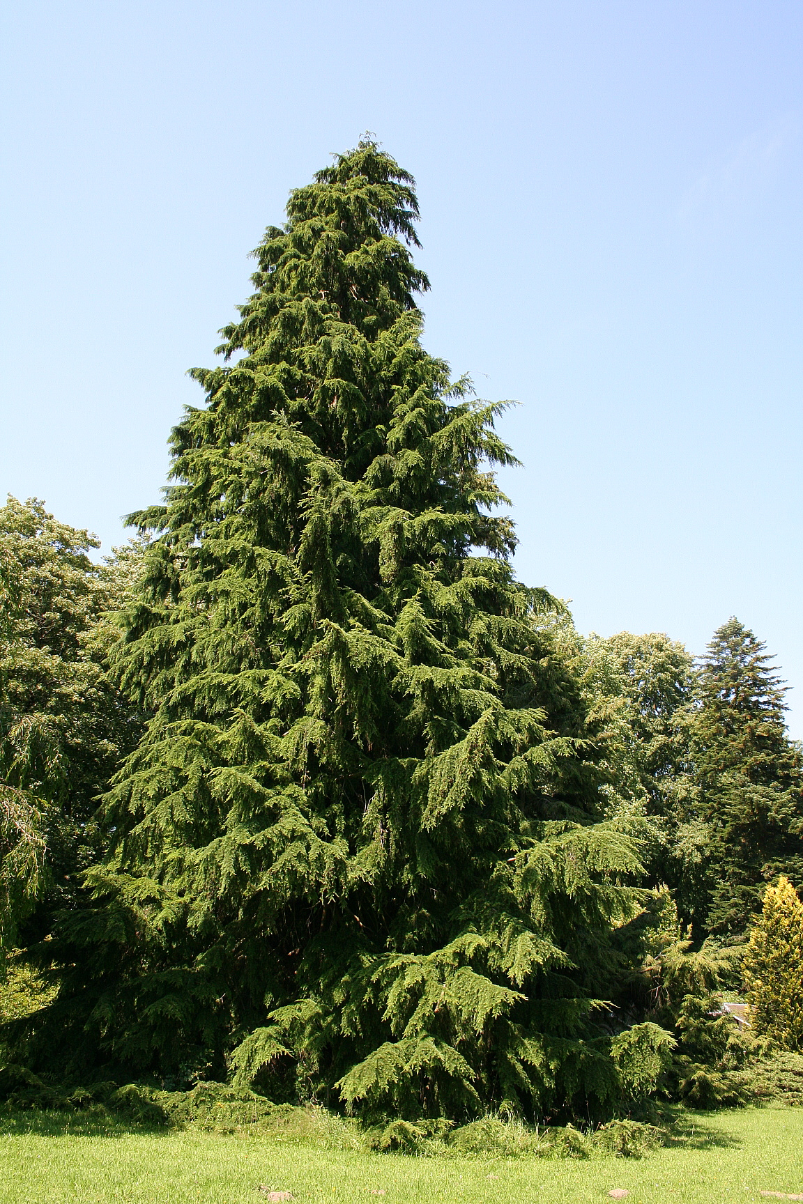 Pruche de l'Ouest pleureur , (Tsuga heterophylla 'Pendula').